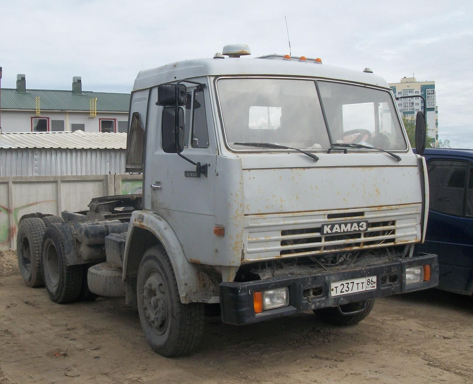 Автомобиль КамАЗ-54115, г. Ханты-Мансийск